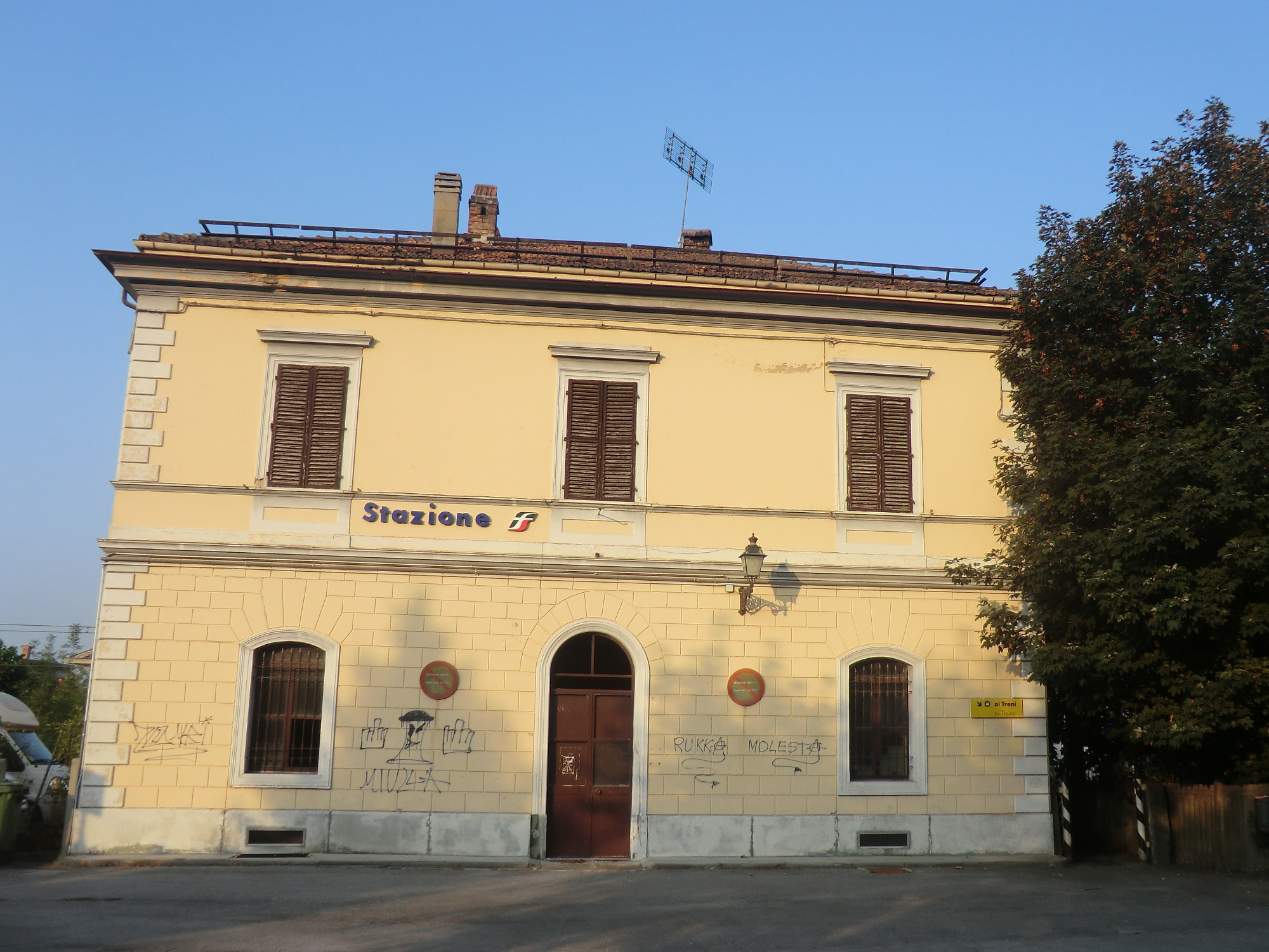 Roccavione (Cuneo): stazione ferroviaria (esterno)